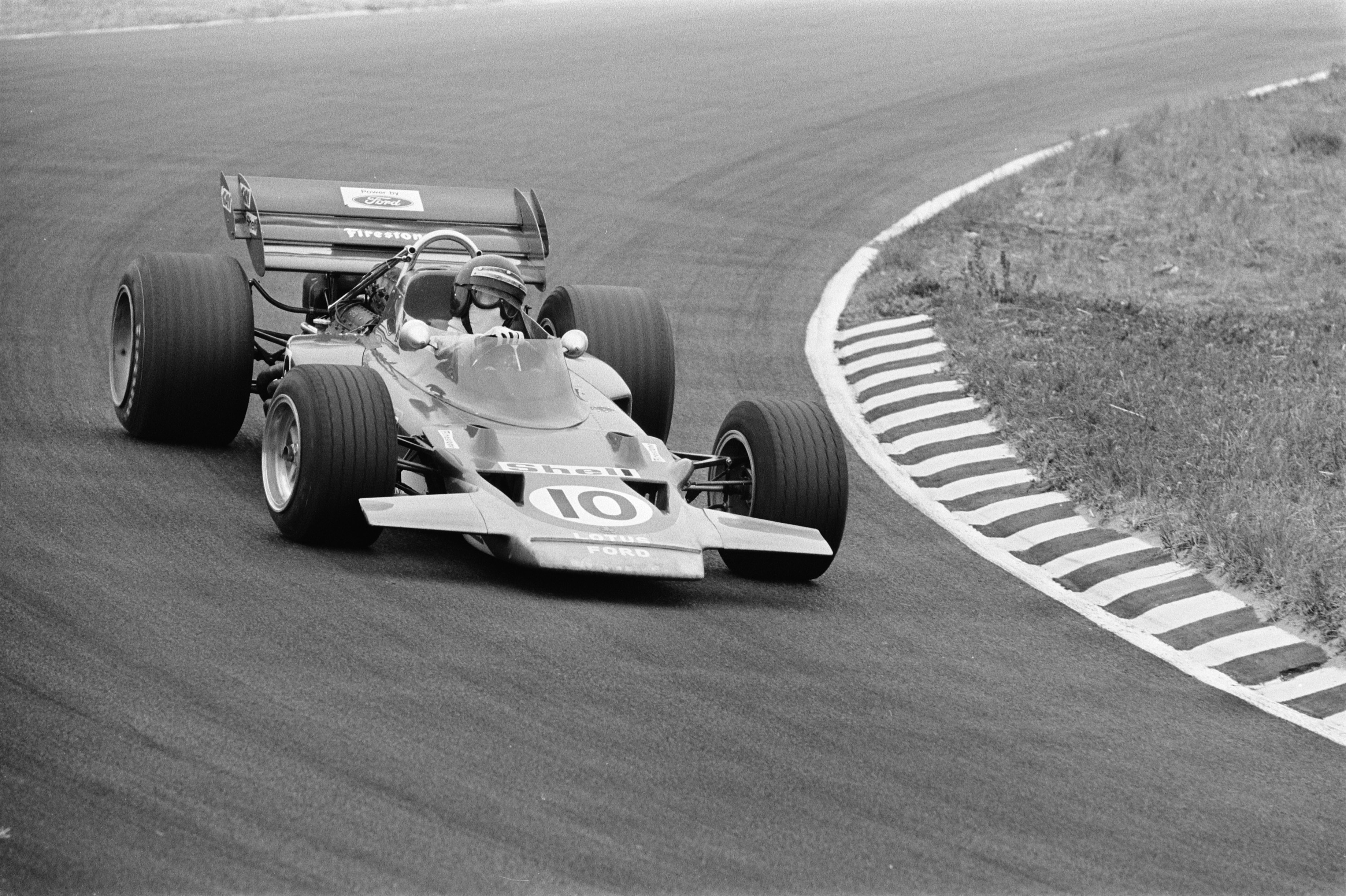 Grand Prix 1970 van Nederland voor Formule I wagens , Zandvoort; aktie.